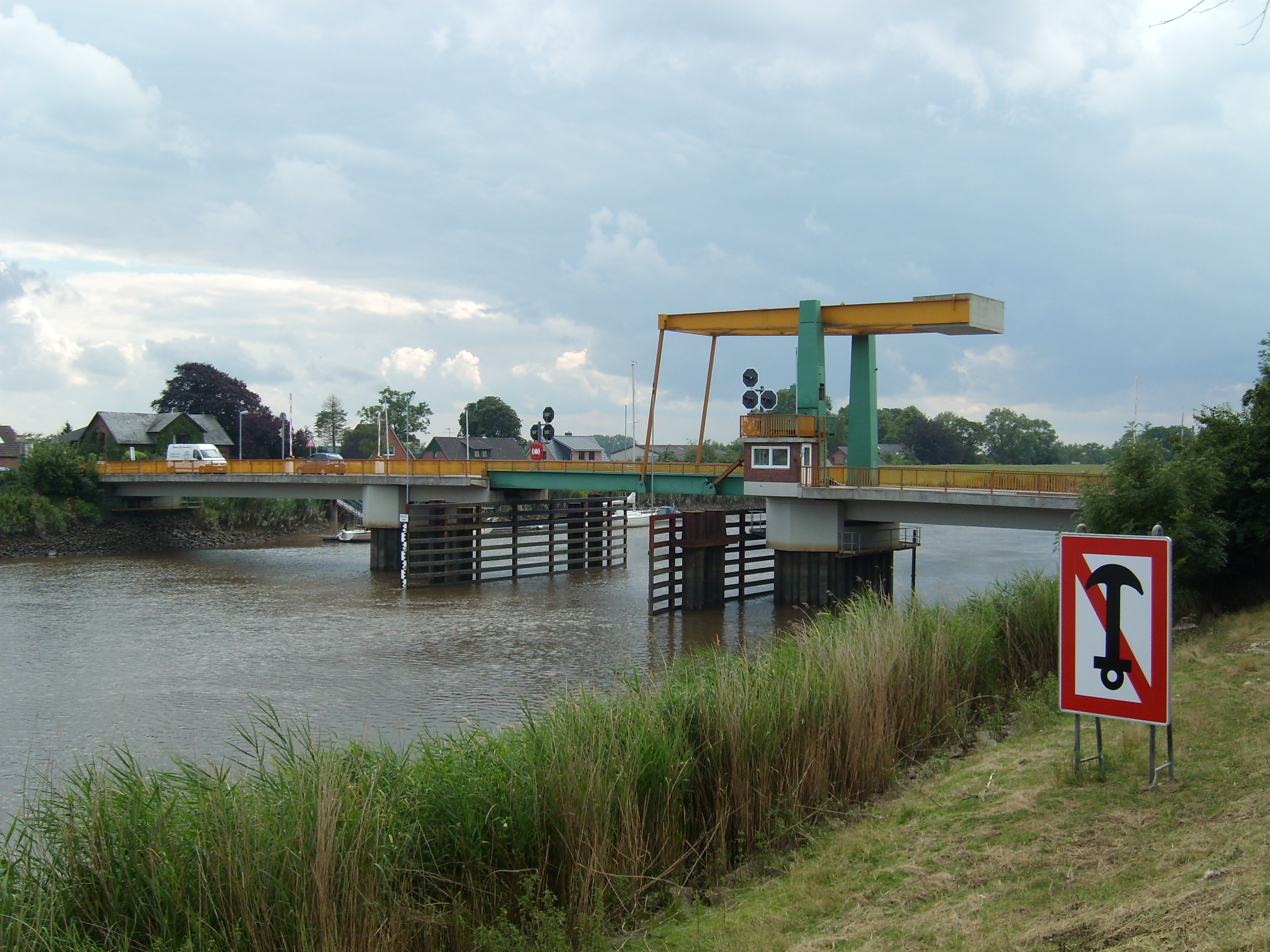 Die Klappbrücke über die Stör in Heiligenstedten vom rechten (nordwestlichen) Störufer aus gesehen